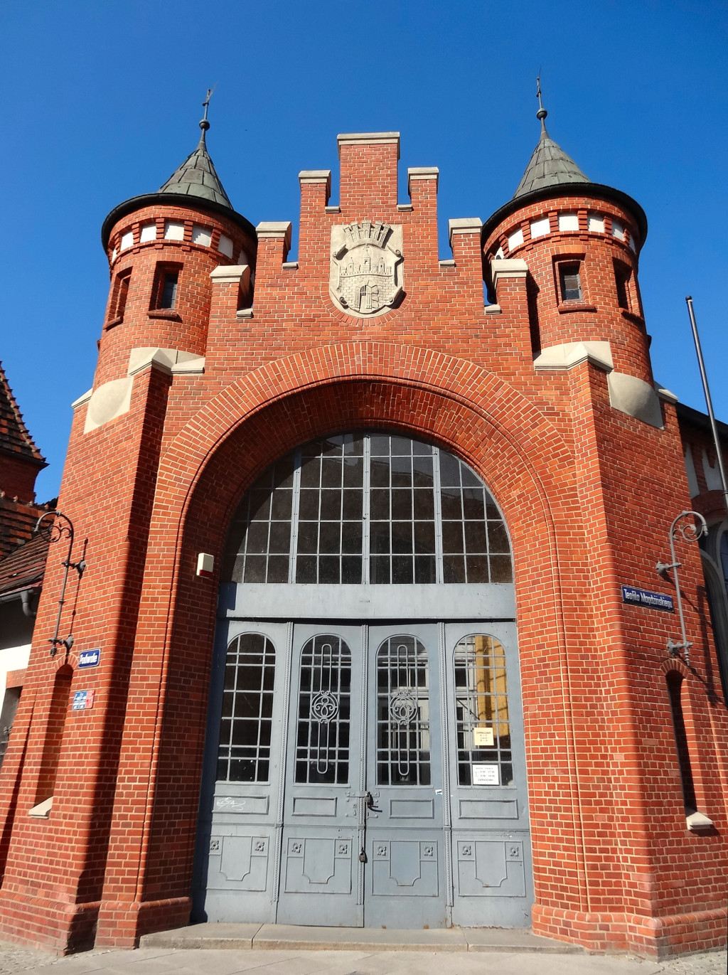 Miejska hala targowa w Bydgoszczy przy ul. Podwale zbud. 1906 r